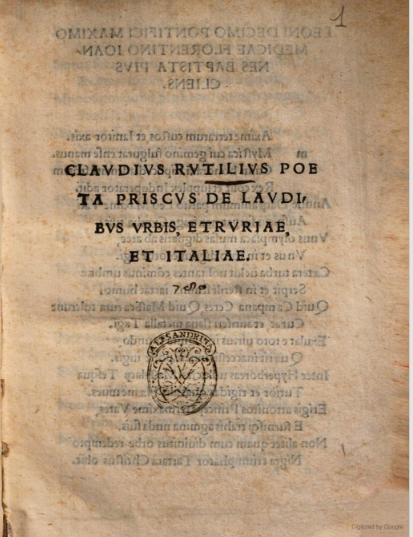 Rutilius Namatianus, editio princeps 1520, titulus